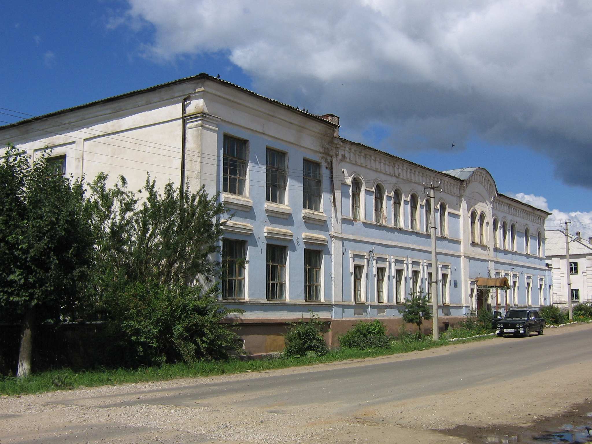 Гимназия женская (Тверская область, Белый, улица Ленина, 14)